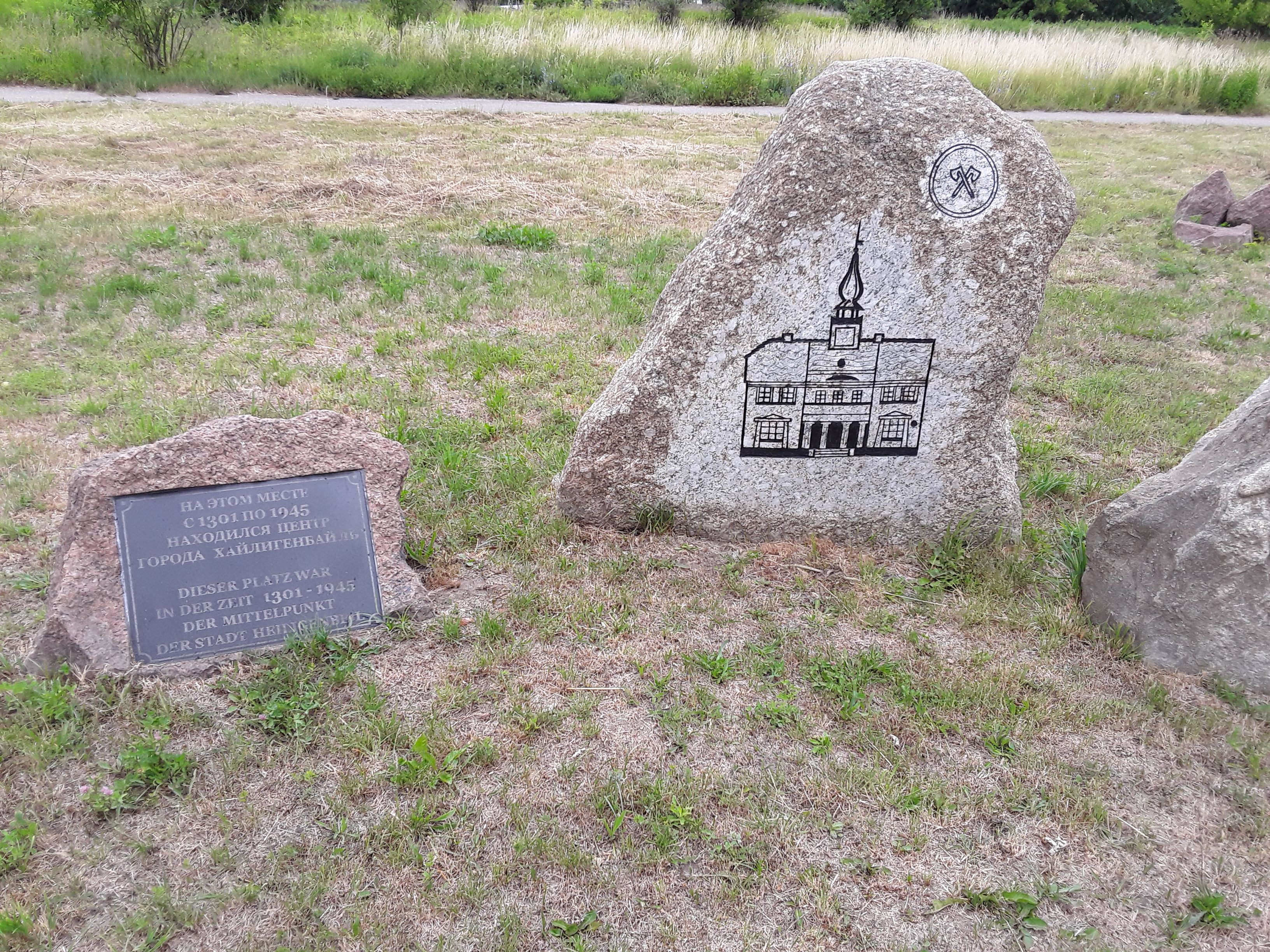 Heiligenbeil, Standort des früheren Rathauses